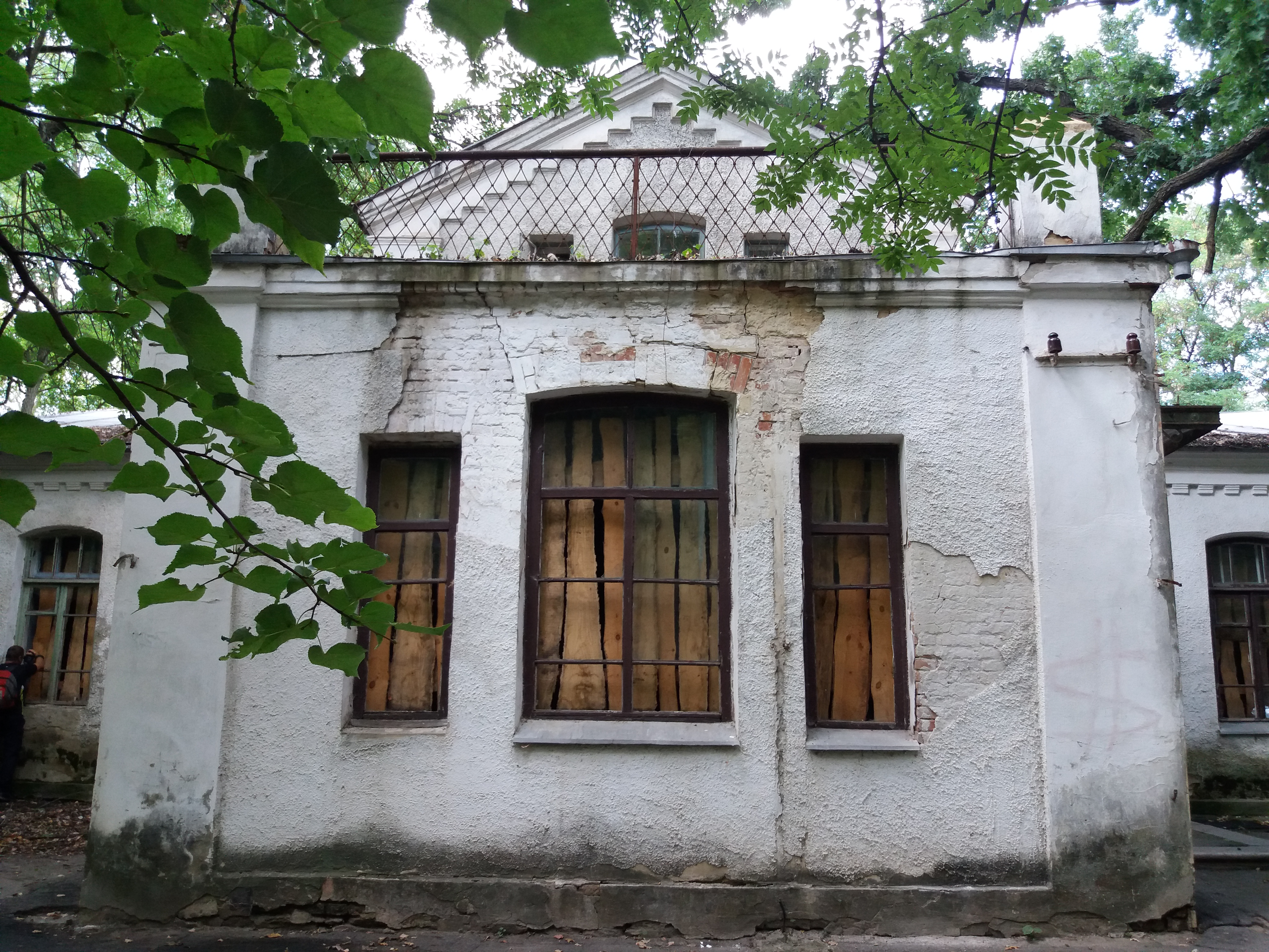 Комплекс будівель маєтку графа Толстого - Біла їдальня графа Толстого, Онуфріївка, вул. гр. Толстого